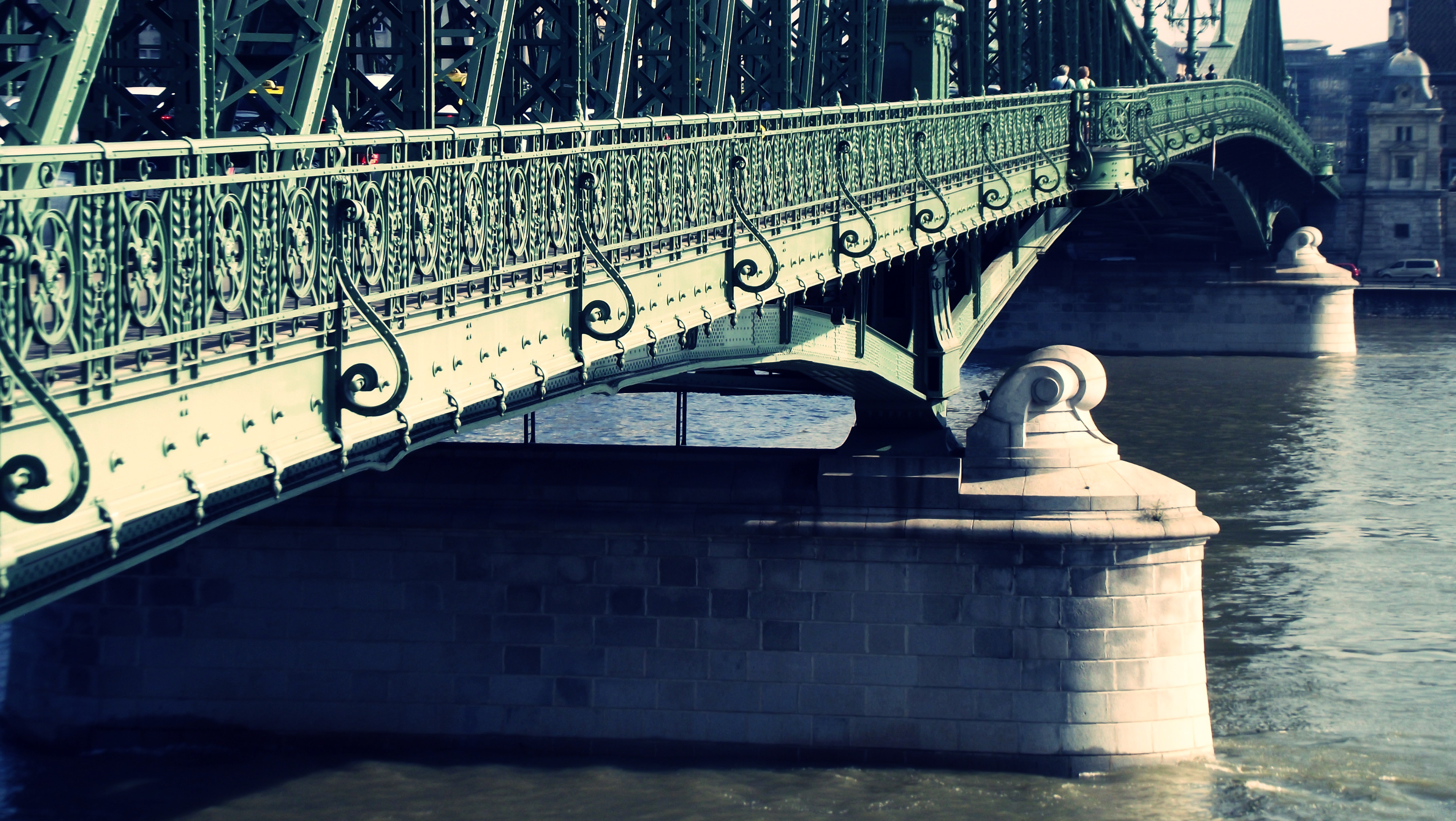 Budapesti Szabadság híd a budai oldalról 2014 őszén